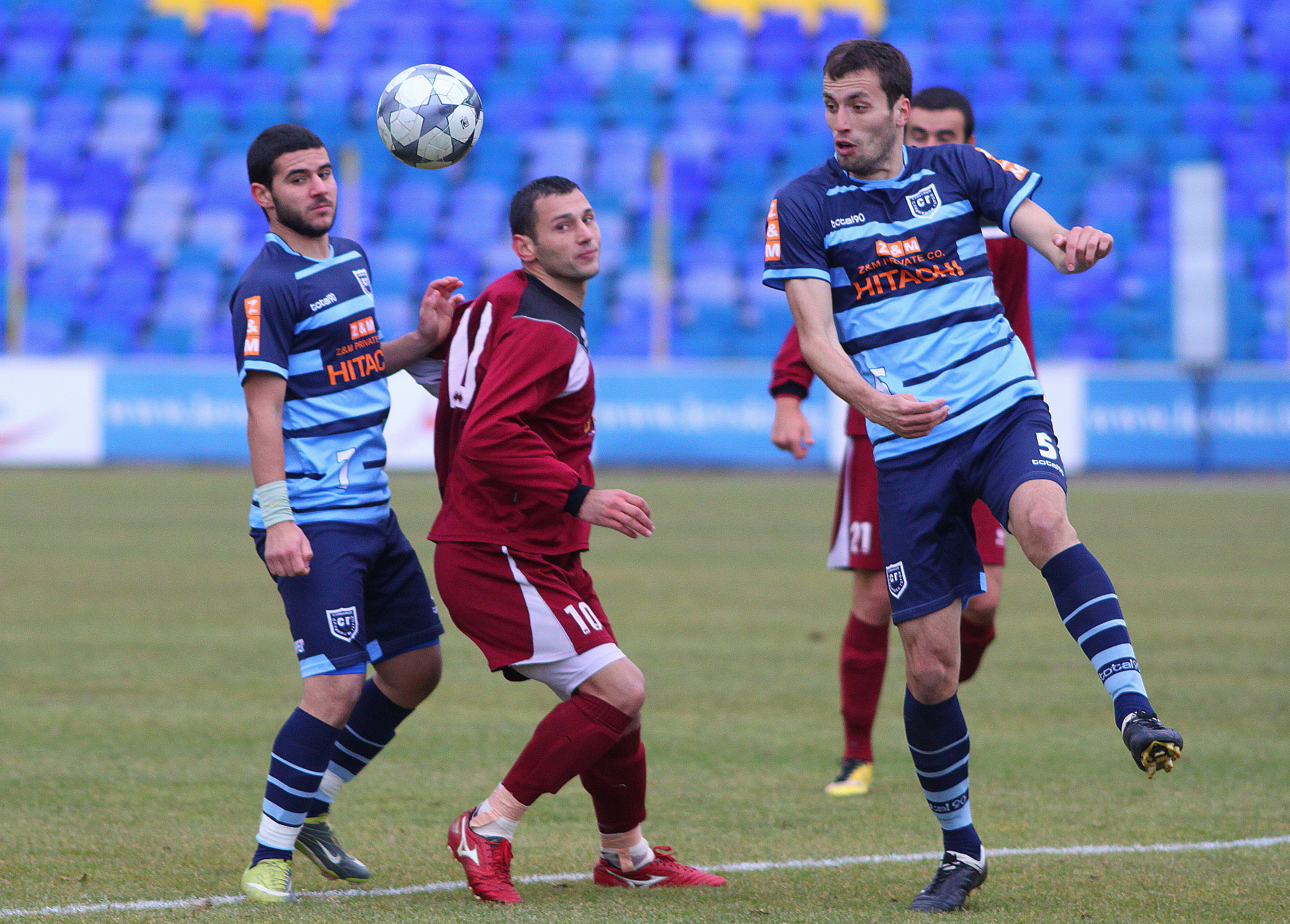 Момент от мача Сливнишки герой-ФК Банско, 0-3, 11 ное 2011 година.